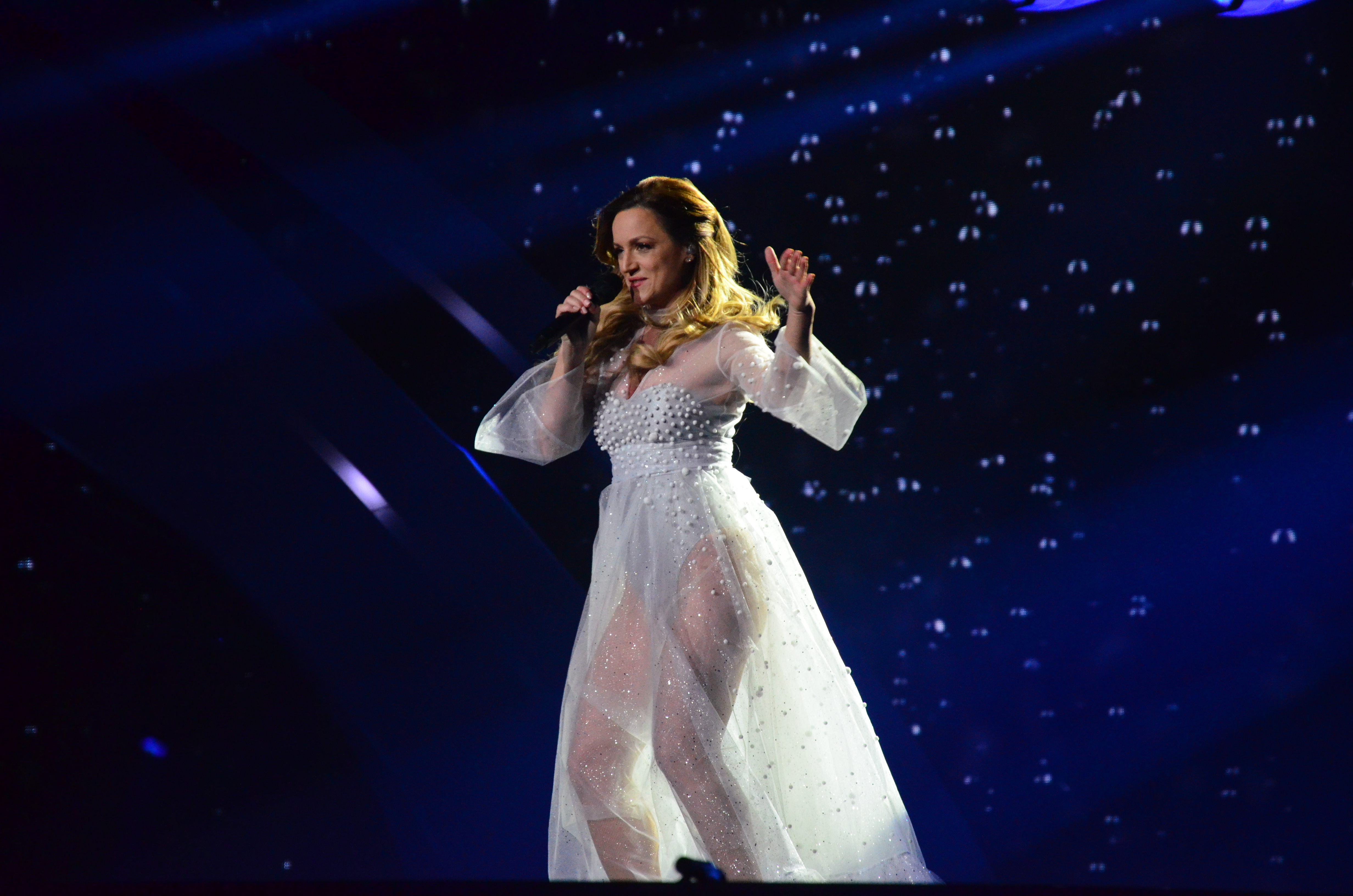 10 травня 2017 року у Києві відбулась генеральна репетиція 2 півфіналу "Євробачення".